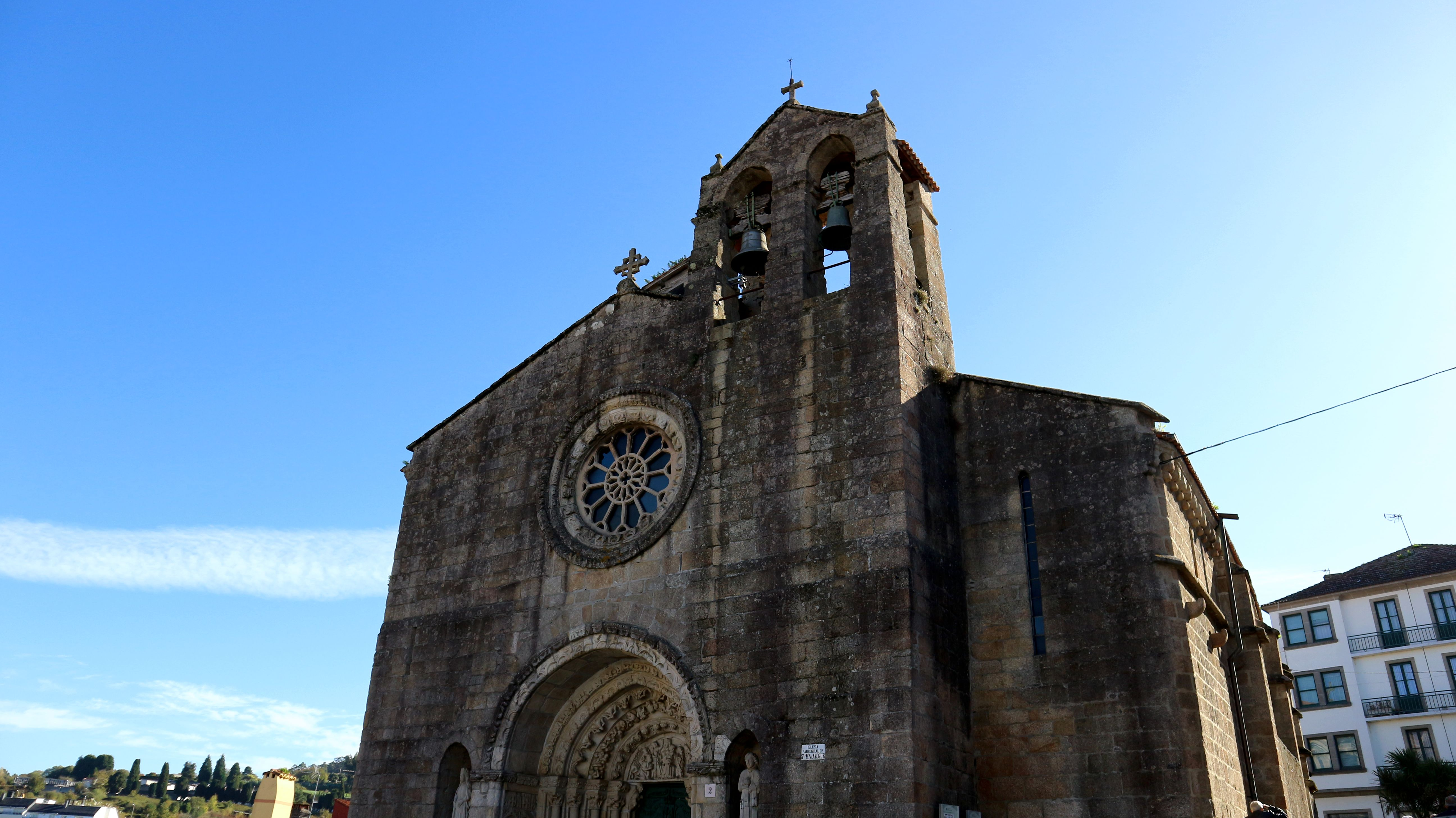 Igrexa de Santa María do Azougue, Betanzos.